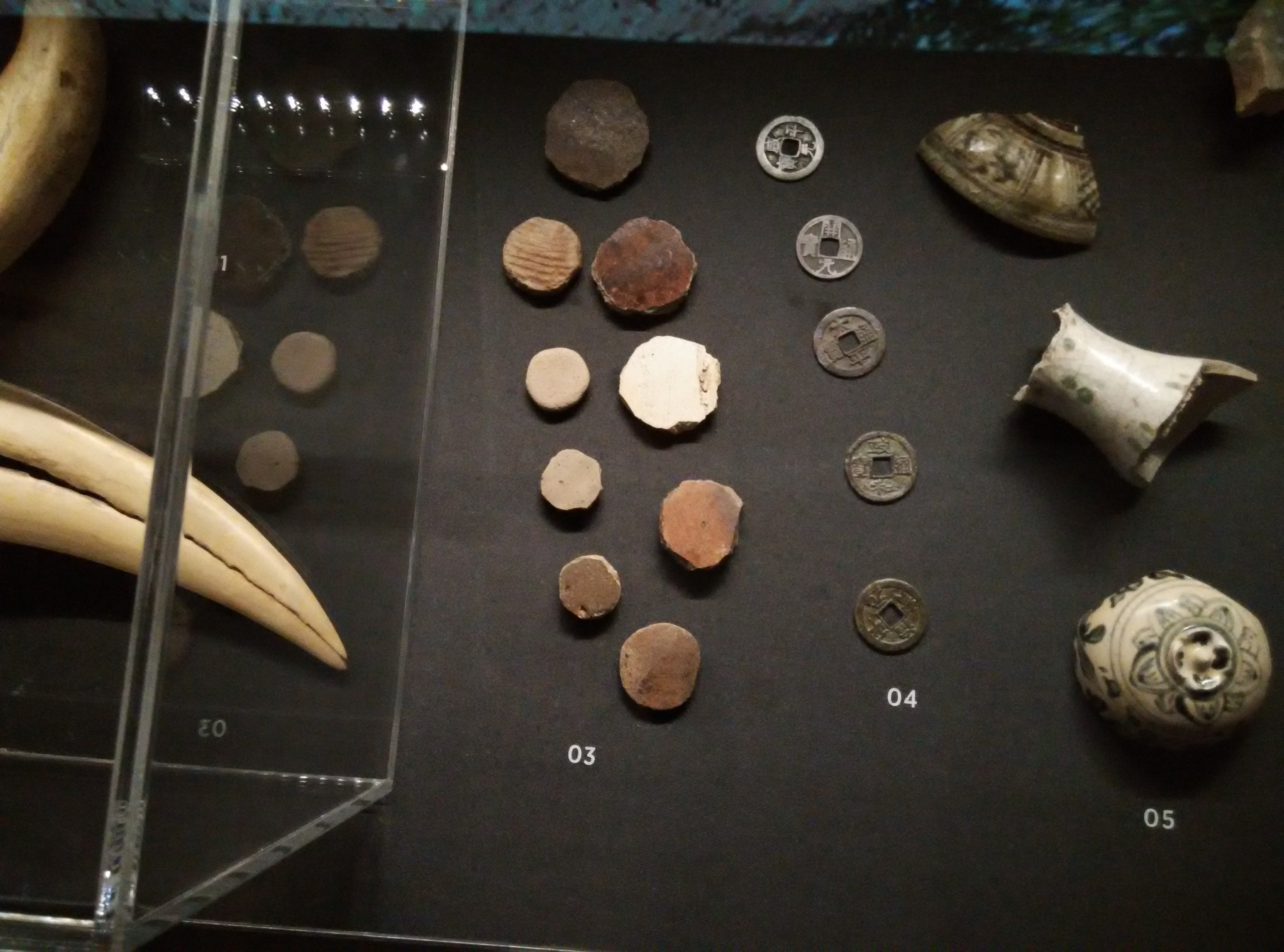 中文（香港）: 新加坡的中國古錢